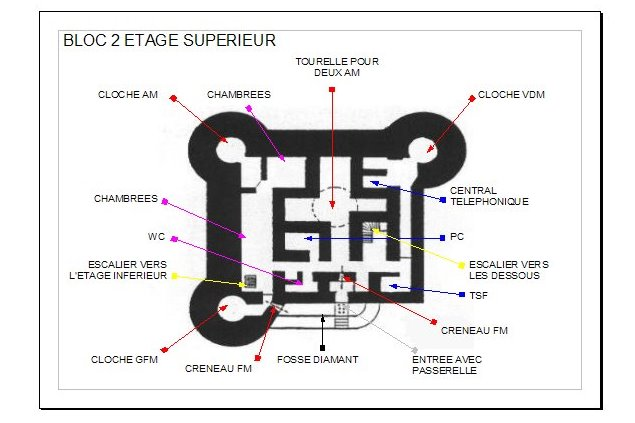 LA FERTE BLOC 2 ETAGE SUPERIEUR.